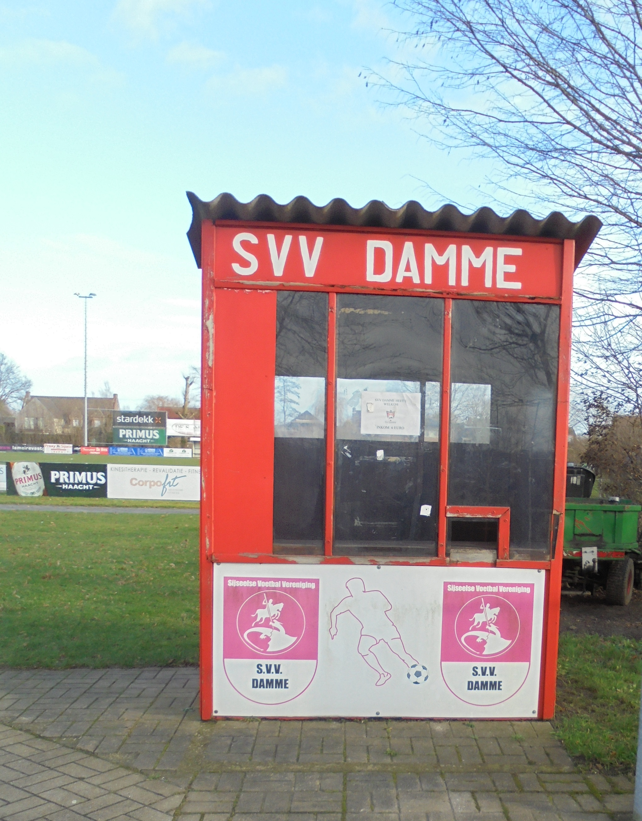 Betaalloket - SVV Damme - Voetbalploeg in de KBVB - stamnummer 08143 - Eikelberg - Damme - West-Vlaanderen - België